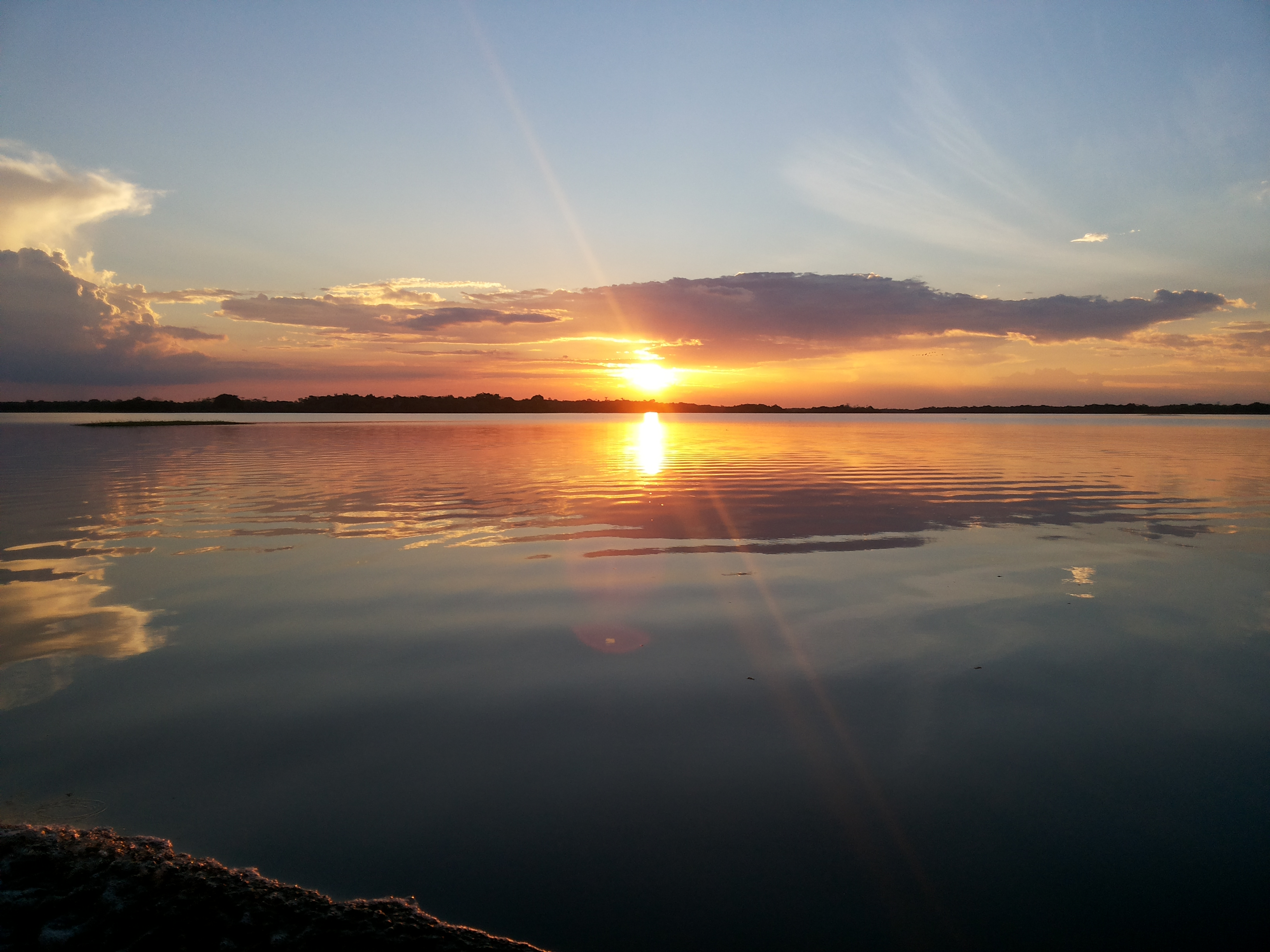 Pôr do sol em Manaquiri. Comunidade Bom Intento-Lago do fuxico.